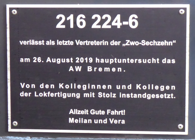 Letzte Lokomotive mit Untersuchung in Bremen